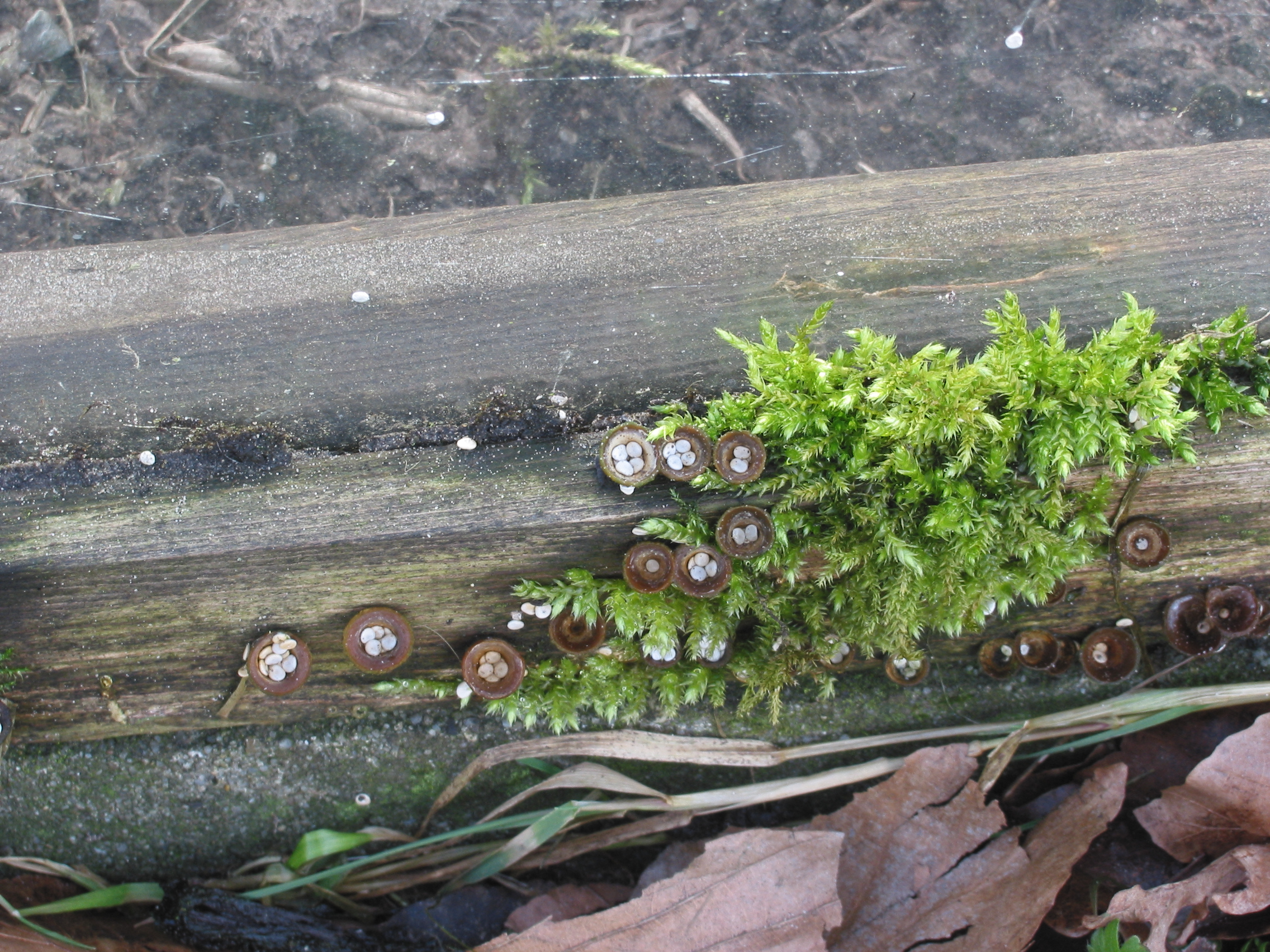 Bleek nestzwammetje (Cyathus olla)